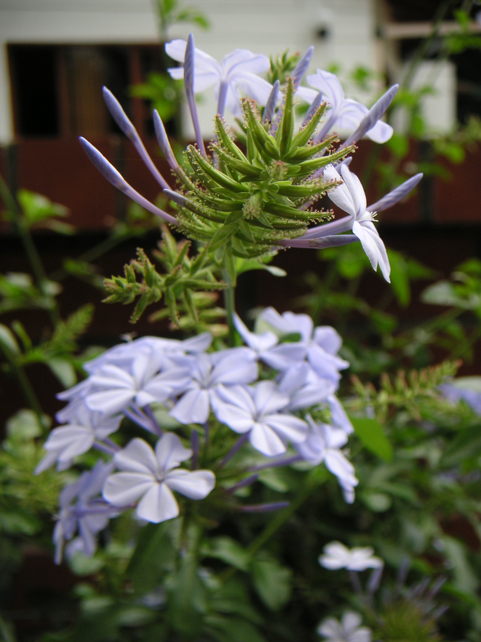 Plumbago auriculata, Plumbaginaceae, Cali / Kolumbien